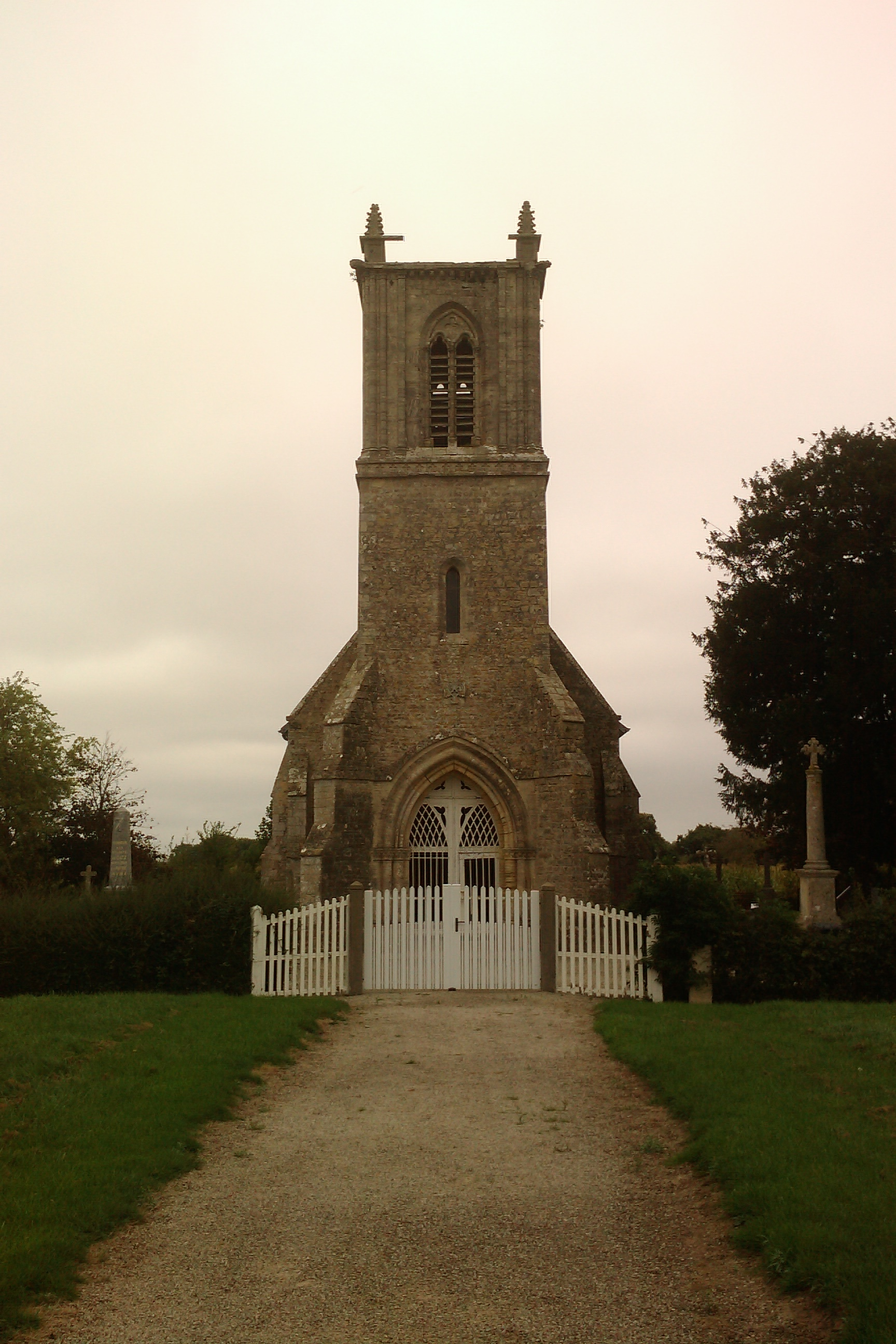 Église Saint-Grégoire le Grand de Catz